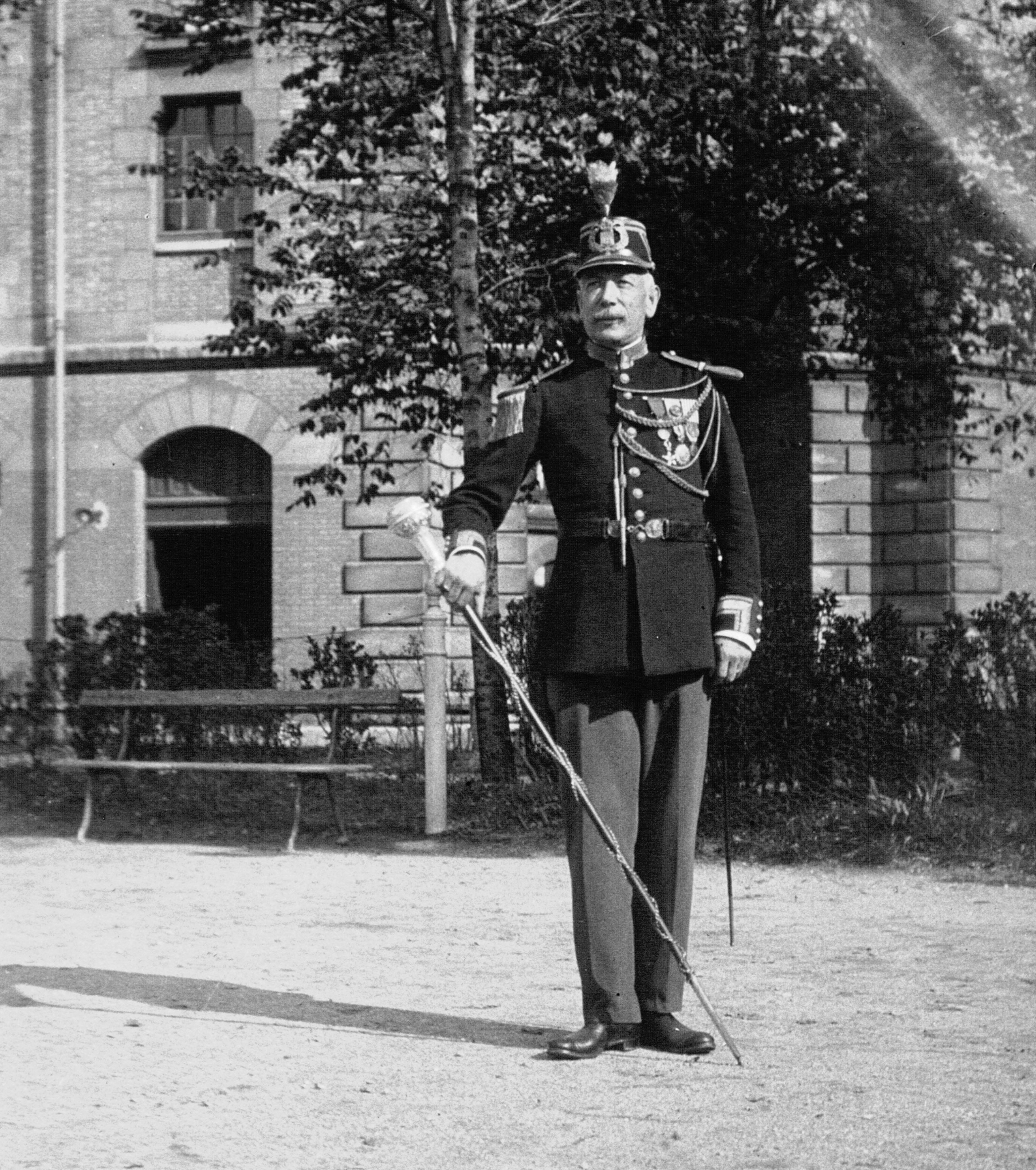 Gabriel Defrance, tambour-major de la Garde républicaine française avant sa retraite.